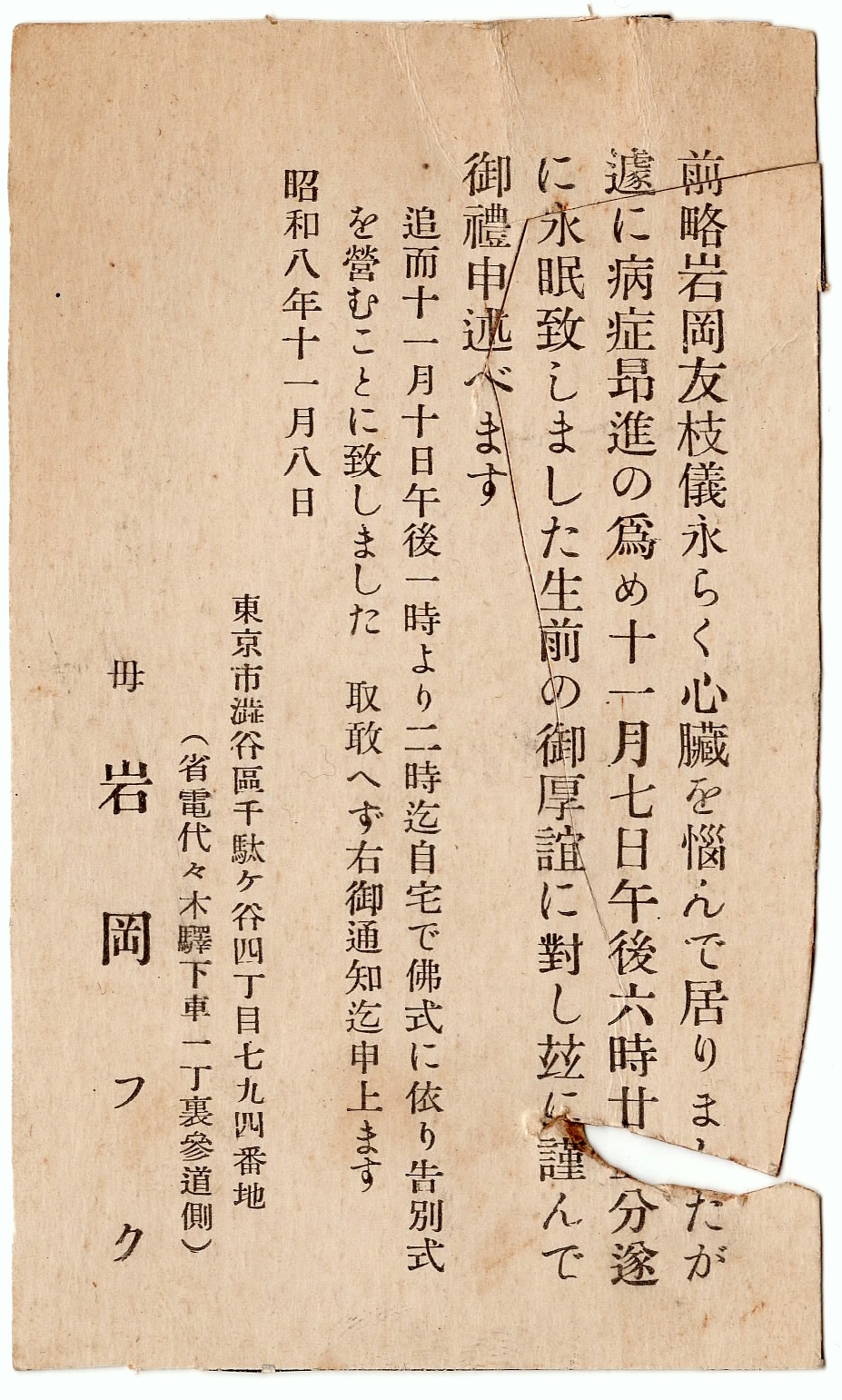 岩岡とも枝の死亡通知葉書